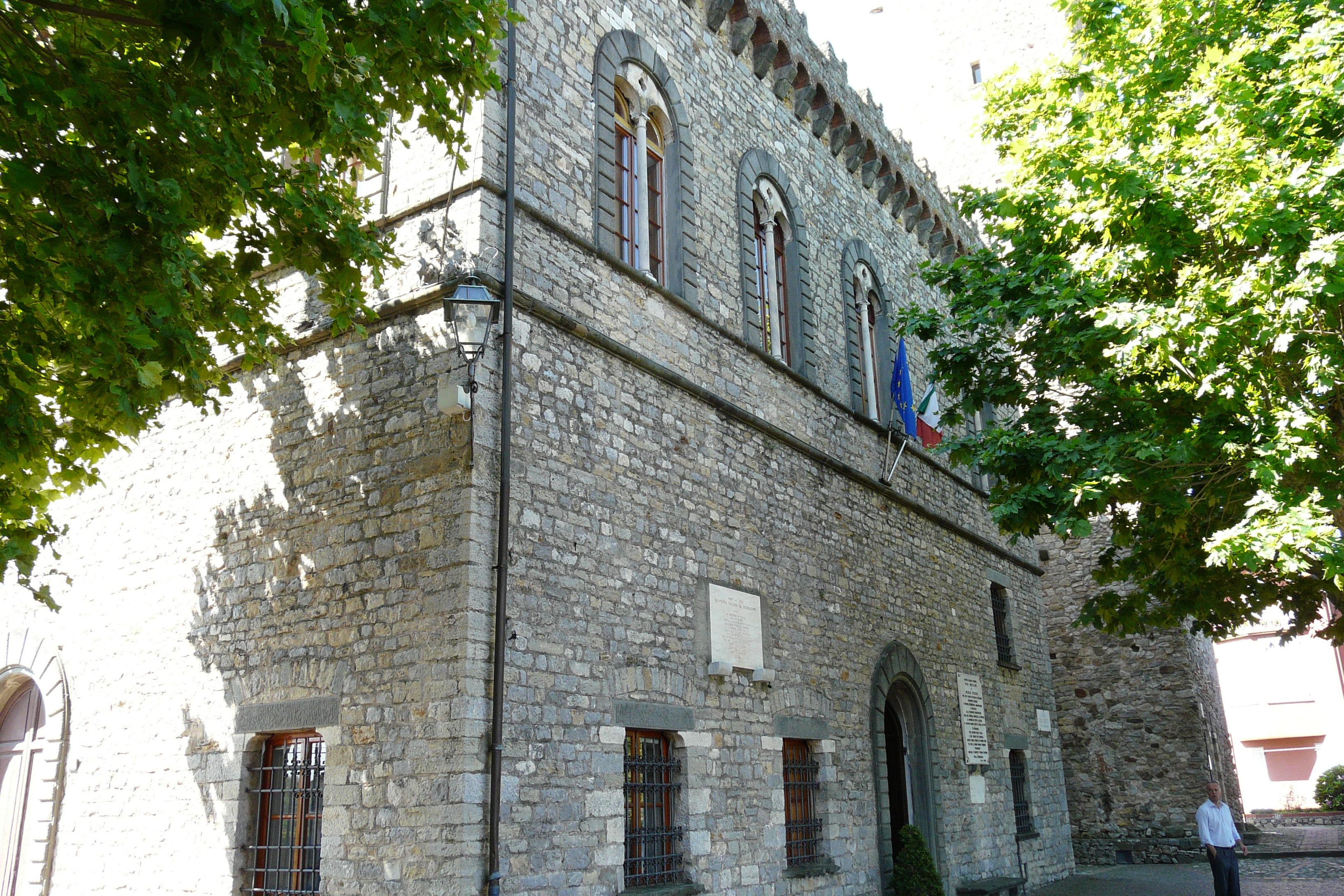 Castello-Municipio di Arcola, Liguria, Italia